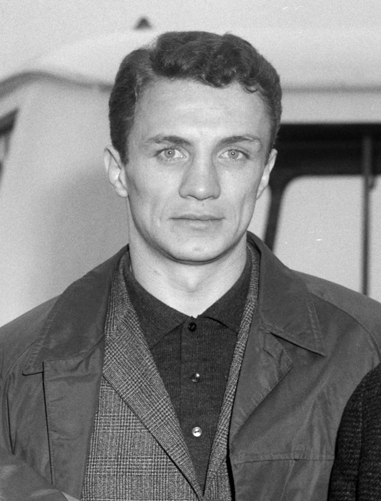 Aankomst boksploegen op Schiphol, de Hongaarse ploeg, István Gali